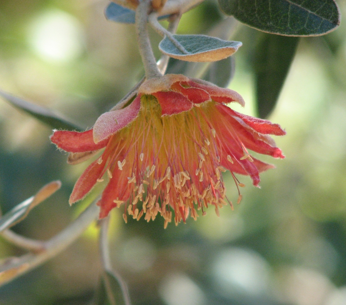 Diplolaena grandiflora , Maranoa Gardens, Balwyn, Victoria, Australia